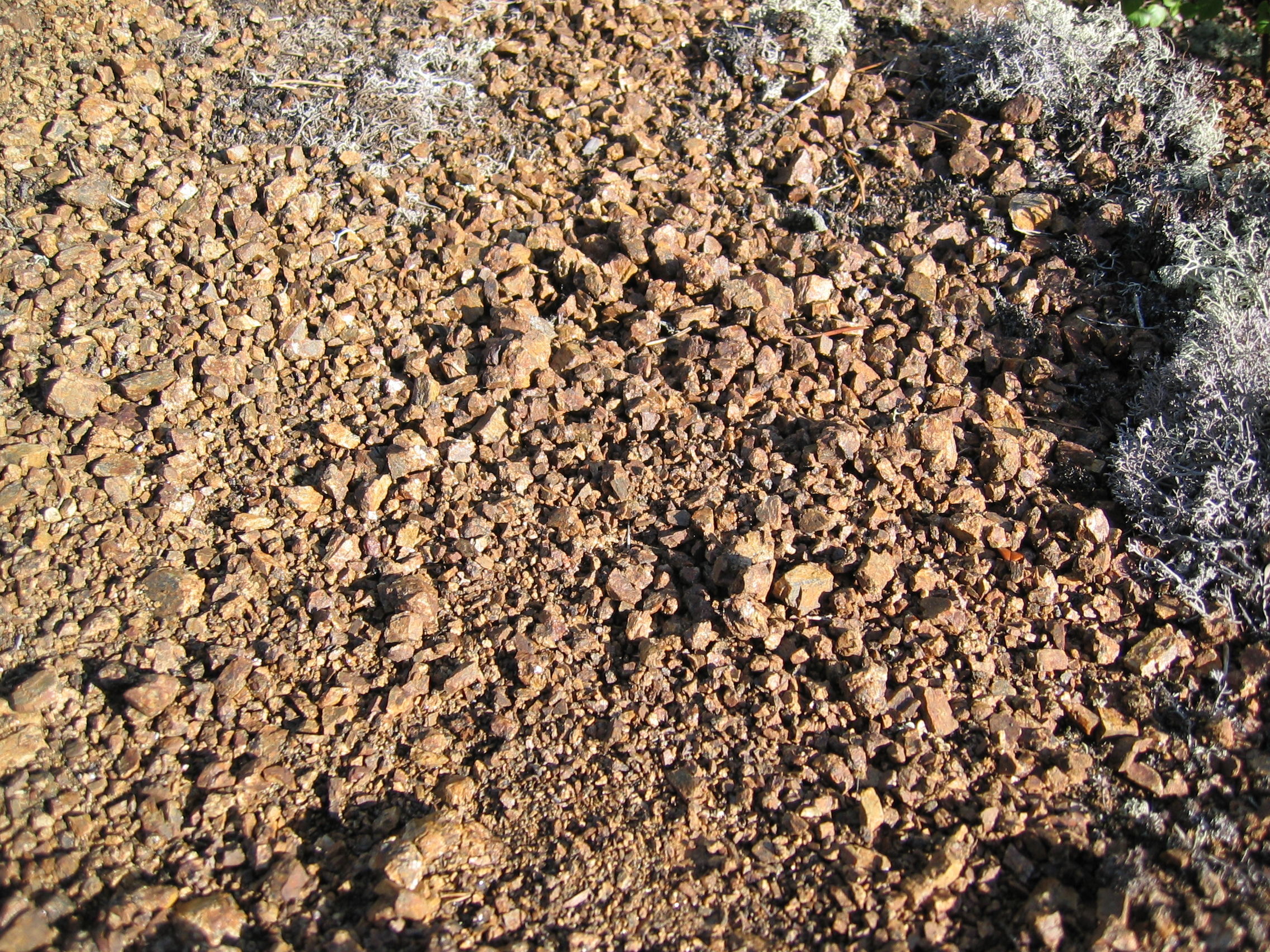 Eroded rapakivi granite